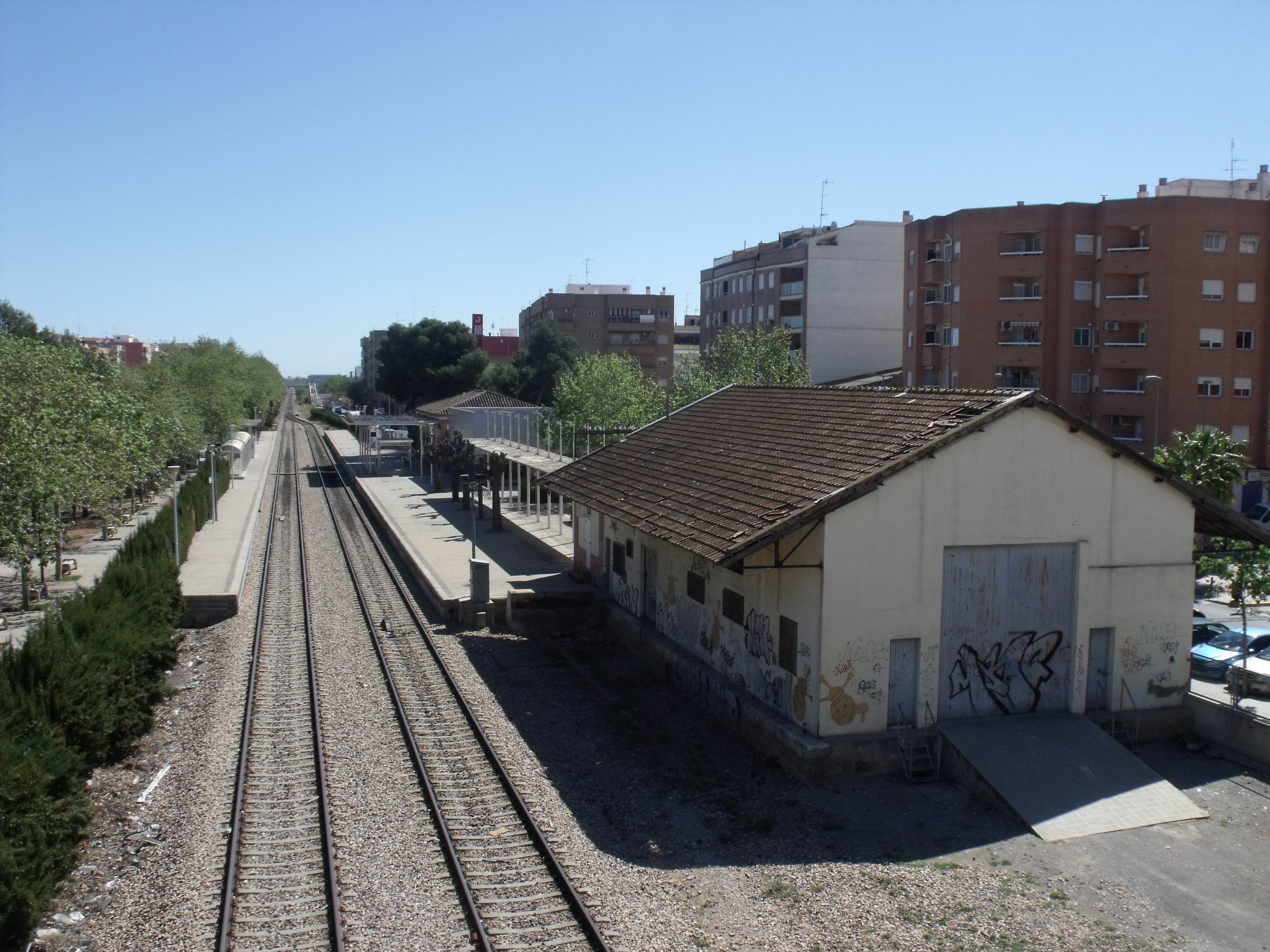 Línea RENFE cercanía C3, a su paso por Aldaia